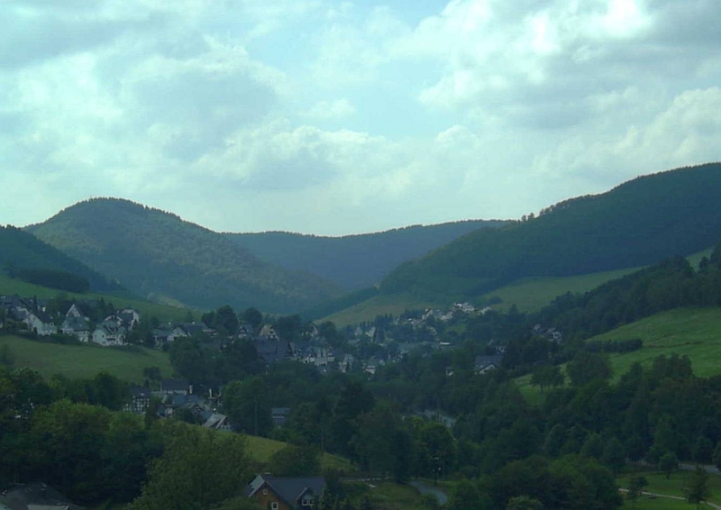 Westfeld (Schmallenberg), Germany.